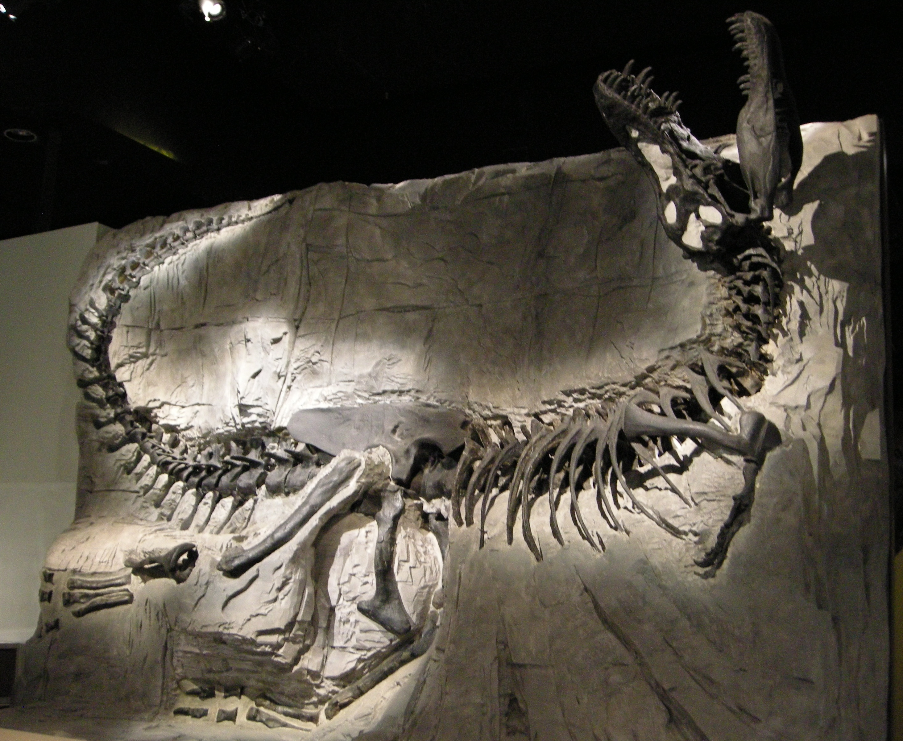 T-rex skeleton - Tyrell Museum